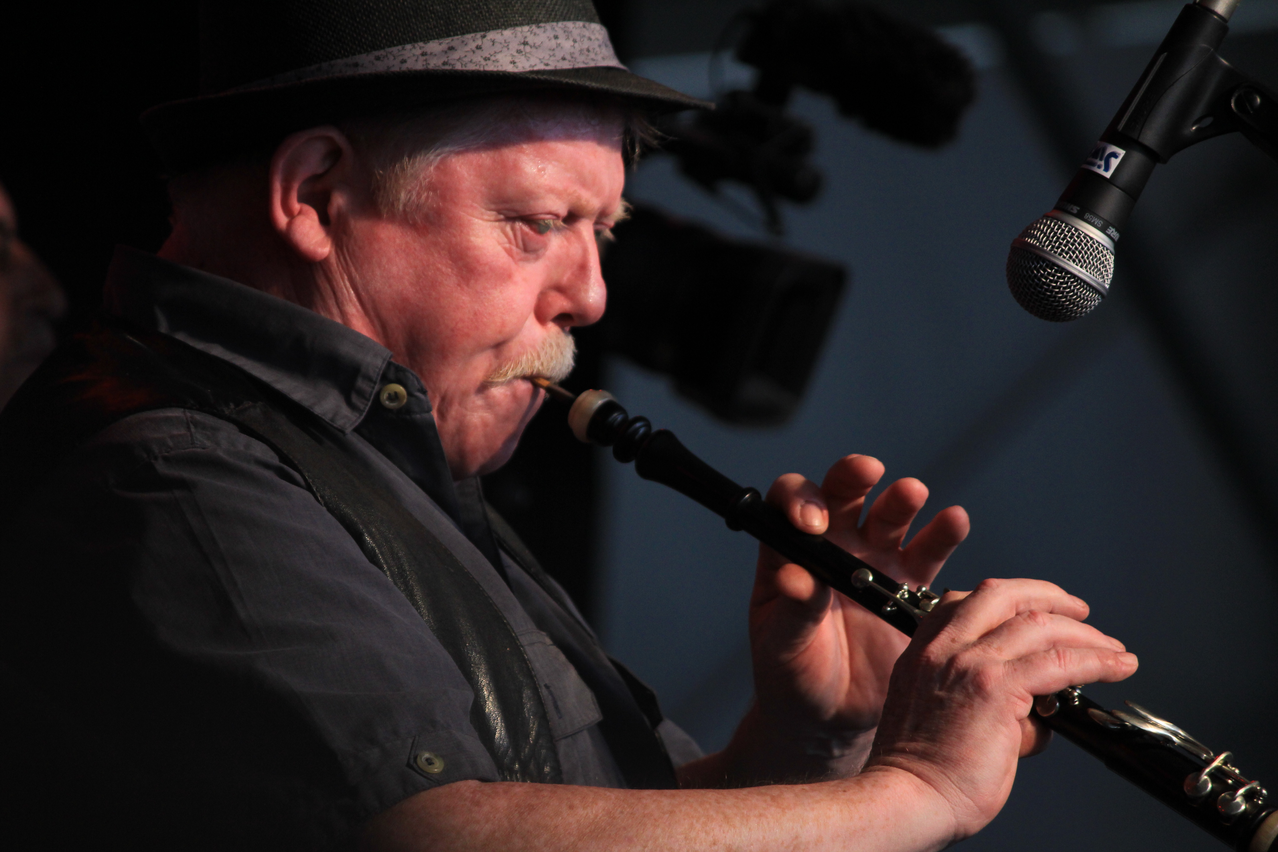 Concert de Skolvan lors du festival interceltique de Lorient 2014.